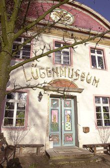 Eingang zum Lügenmuseum in Gantikow, Deutschland.